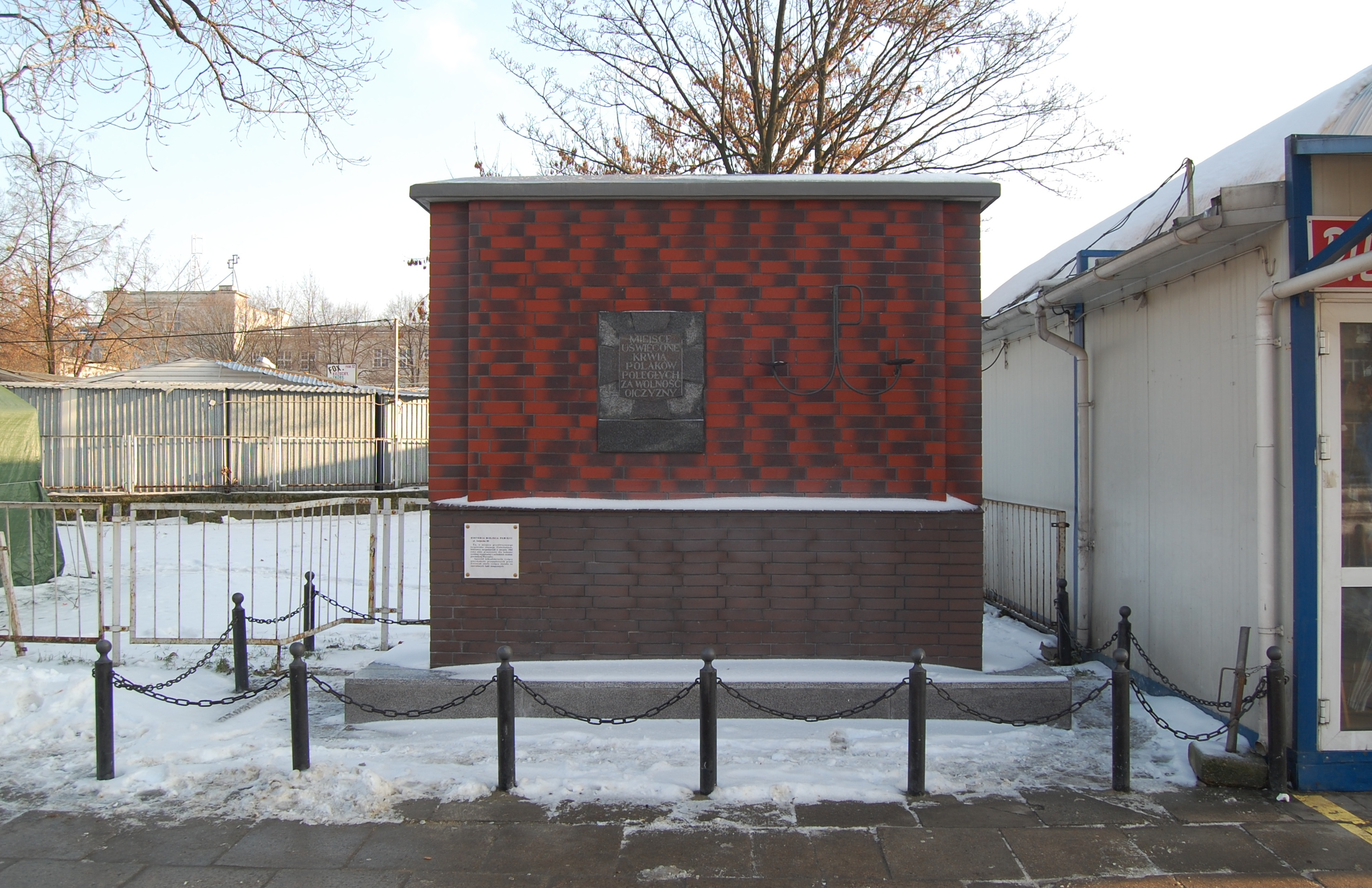 Tablica upamiętniająca istnienie na terenie dzisiejszych Hal Banacha i targowiska obozu przejściowego dla mieszkańców Warszawy wysiedlonych w czasie i po upadku powstania warszawskiego.